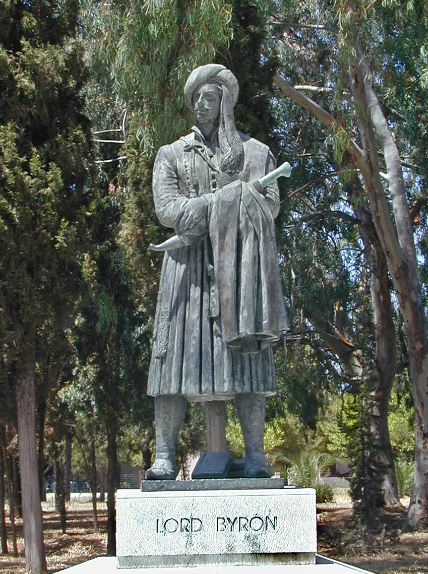 Statue de Lord Byron Byron arriva en janvier 1824 et mourut de fièvre en avril. Son coeur est enterré sous sa statut. Jardin des Héros à Missolonghi ou Mesolongi Photo prise en 2003 par l'auteur et publiée sur un site de voyage en Grèce